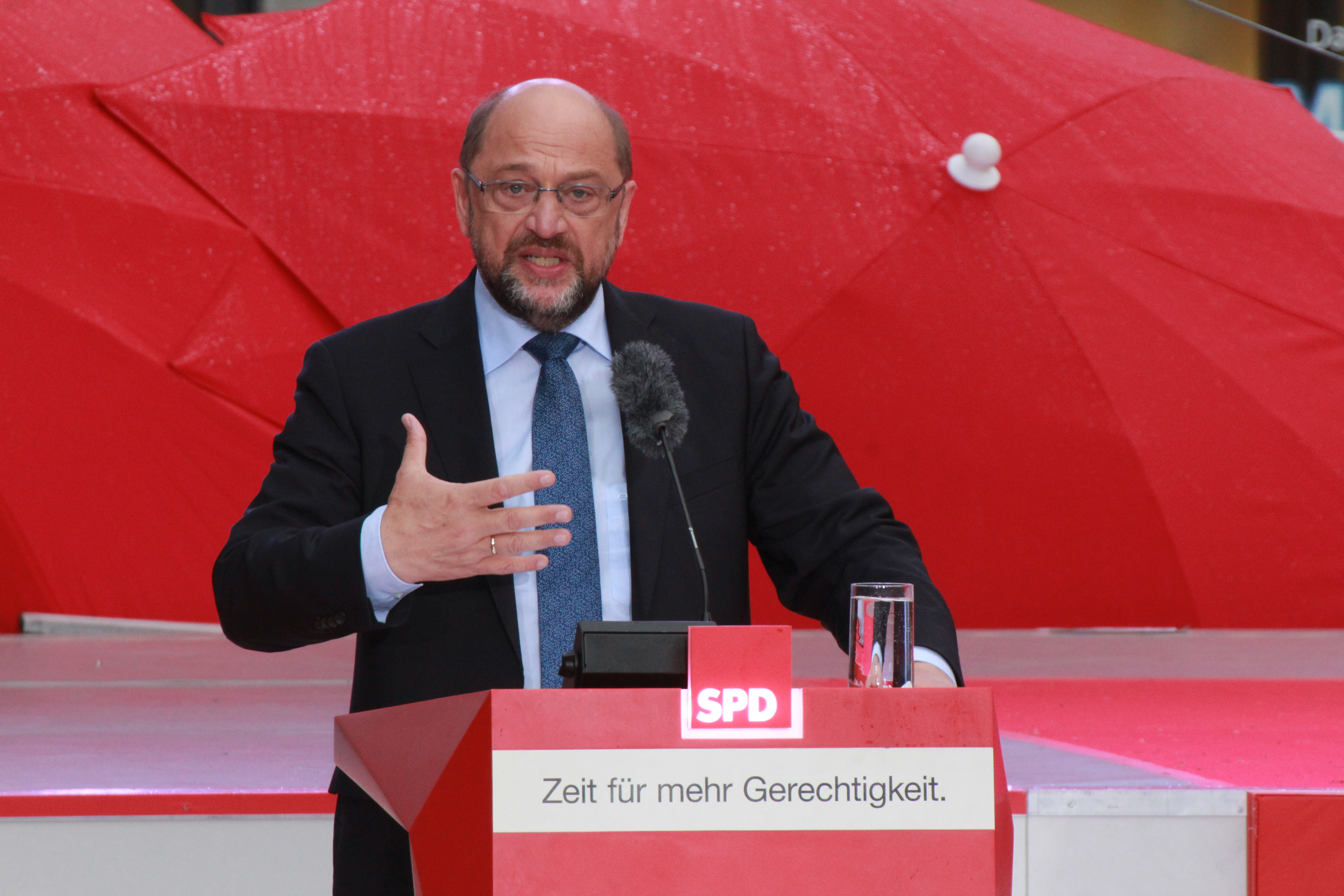 Martin Schulz, SPD-Kanzlerkandidat für die Bundestagswahl 2017, während seiner Rede bei einem Wahlkampfauftritt am 6. September 2017 in der Stubengasse in Münster.